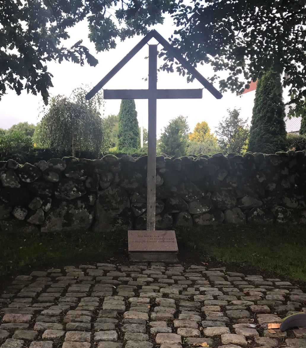 Cruz del camino junto al Camino del Ejército cerca de Kollemorten (Dinamarca)